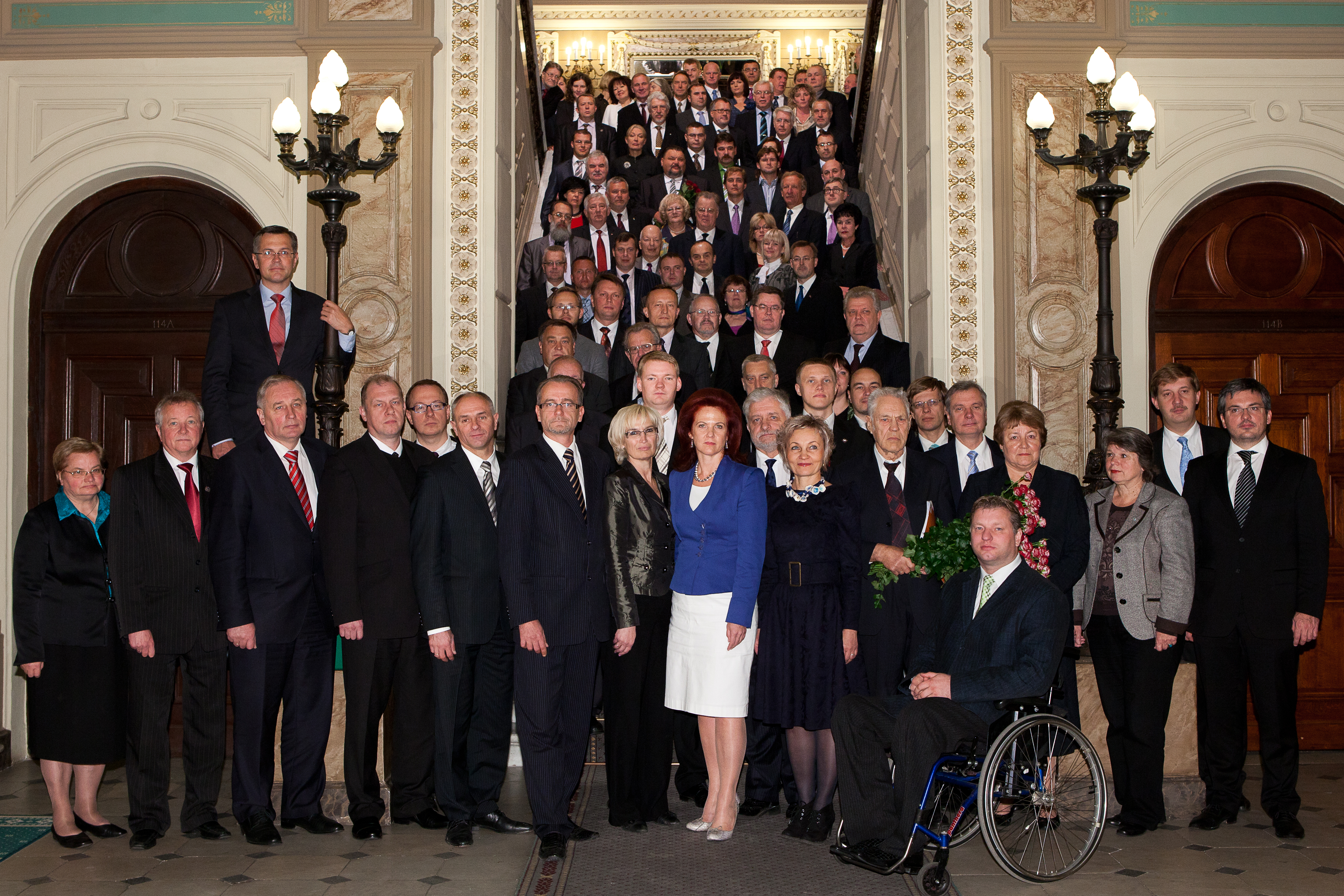 10. Saeima 2011.gada 13.oktobris. Pēc 10.Saeimas pēdējās sēdes deputāti tradicionāli pulcējas uz kopīgo fotografēšanos uz Saeimas nama Lielajām kāpnēm. Foto: Ernests Dinka, Saeimas Kanceleja